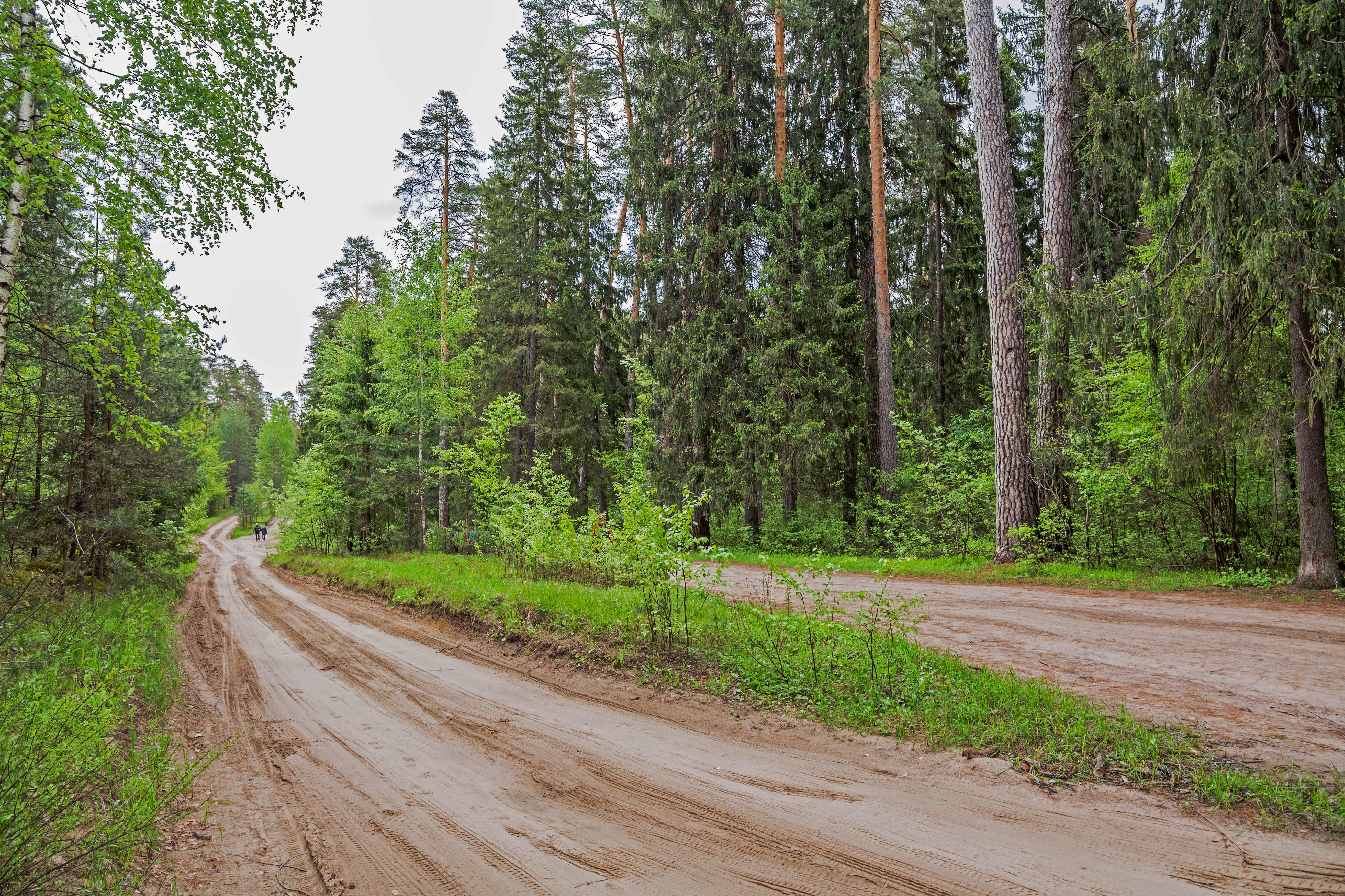 Волжско-Камский заповедник: Зеленодольский район, Татарстан This image is related to the protected area of Russia number 1600082